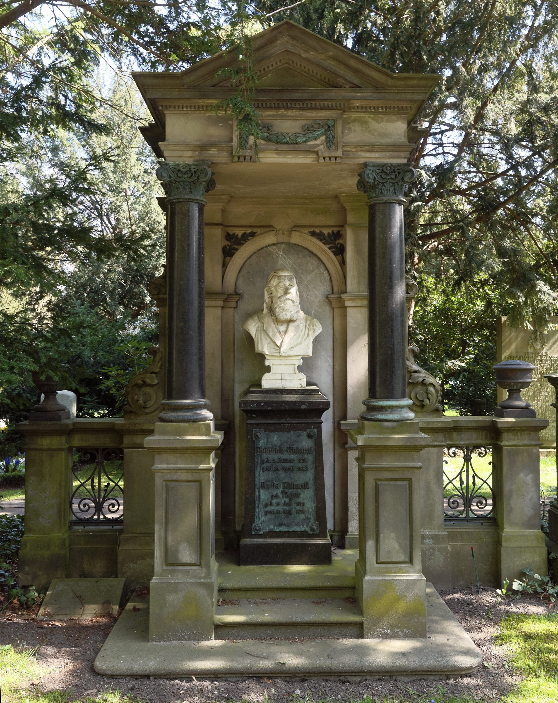 Grab von Heinrich Ebhardt, Mitbegründer von J. C. König & Ebhardt, auf dem Stadtfriedhof Engesohde in Hannover